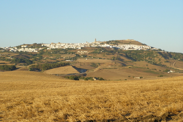 Fotografía de Medina Sidonia.